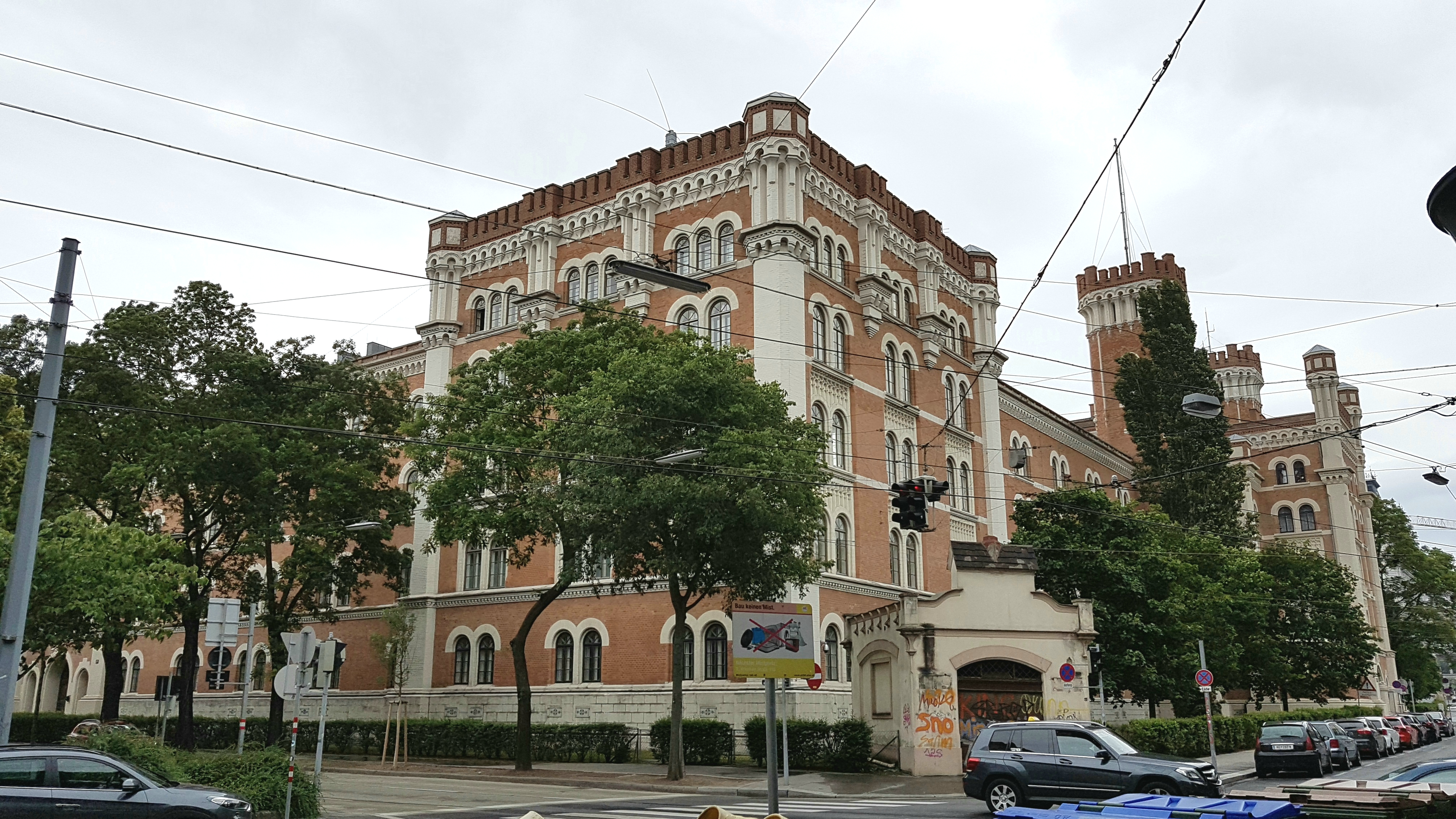 Wien-Alsergrund, Rossauer Kaserne, 1870 von Karl Pilhal im neuromanischen Stil errichteter großer Gebäudekomplex.